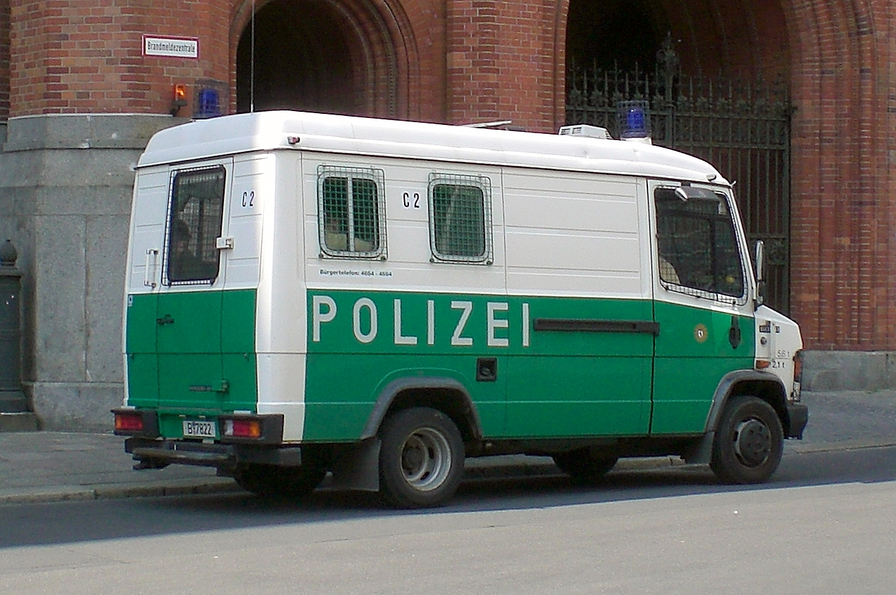 Mercedes Benz GruKw (FuSchei, mit Funk und Scheinwerfer/with Radio and working light) der Berliner Polizei, auch genannt Wanne ("Bathtube"), related to the Direktionshundertschaft 3 (C), zweiter Zug (2)/ Alert Company of the 3rd directorate ("City"), 2nd Platoon.